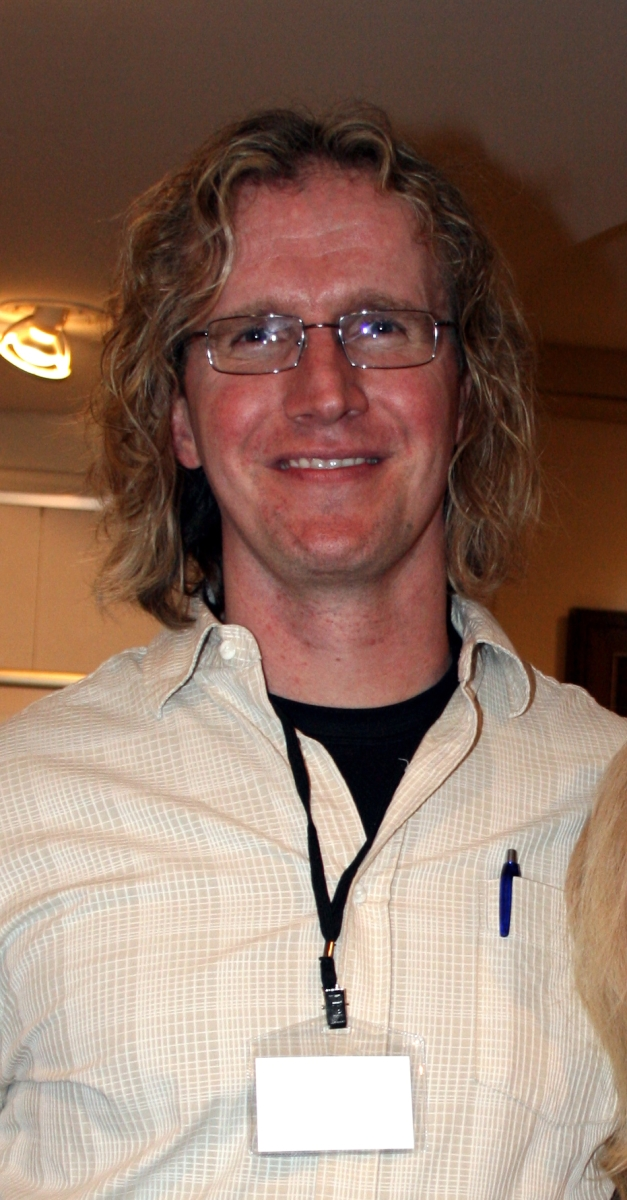 R. Scott Bakker na SFeraKonu 2009.